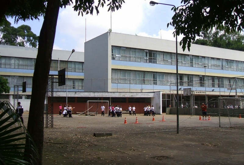 Escola Estadual São Paulo (antigo "Ginásio do Estado"), a mais antiga escola pública de ensino básico em São Paulo (fundada em 1894). No distrito da Sé, cidade de São Paulo, Brasil.